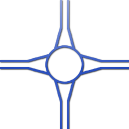 Een schema van een verkeersplein (rotonde dus), gemaakt door mezelf.